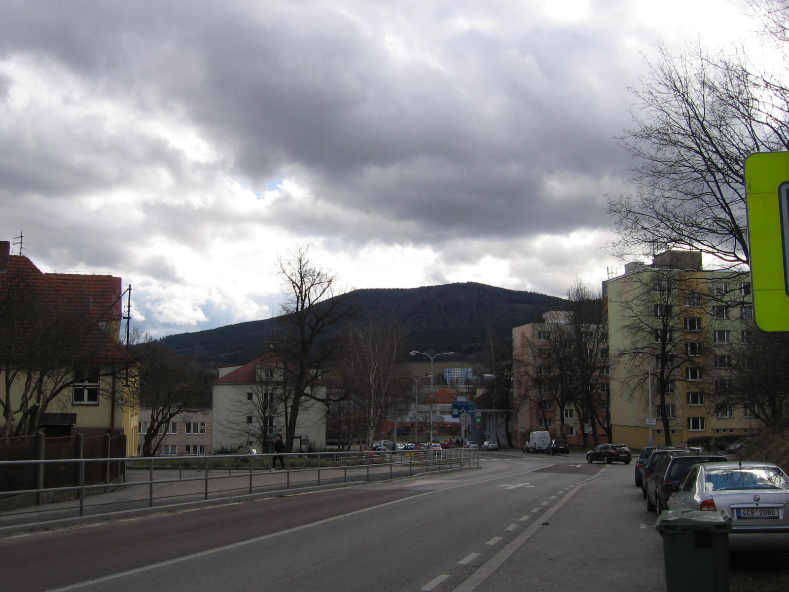 Vodňanská ulice v Prachaticích, ve které sídlí Státní okresní archiv Prachatice